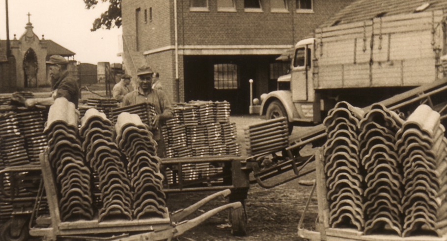 1926 Übernahme Baehren Expansion-Laumans